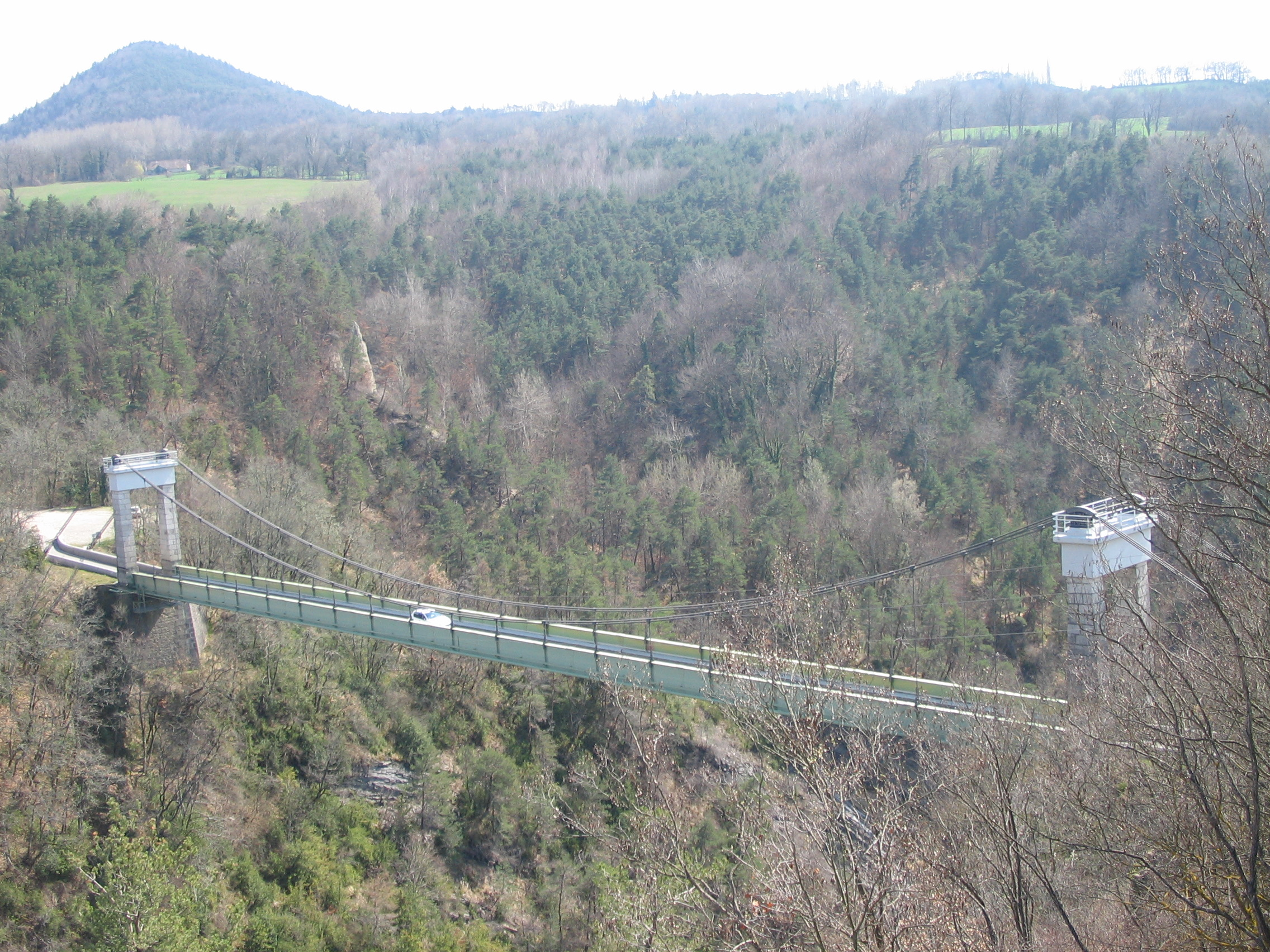 Pont suspendu de Brion (Isère), au-dessus de l'Ebron.